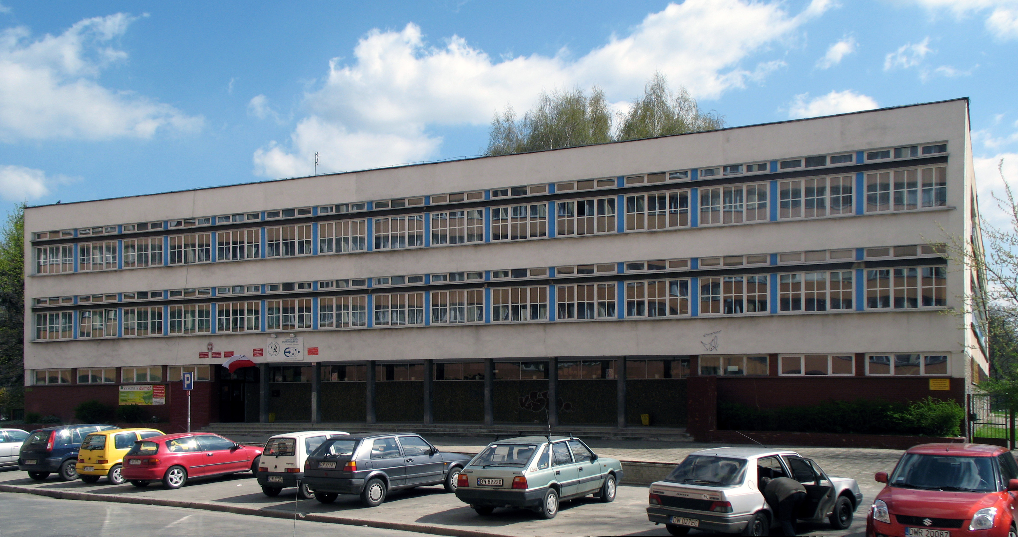 Wrocław, Zespół Szkół Ekonomicznych(Liceum Profilowane nr 8, Technikum nr 8, Technikum Uzupełniające Handlowe dla Dorosłych, ), ul. Drukarska 50